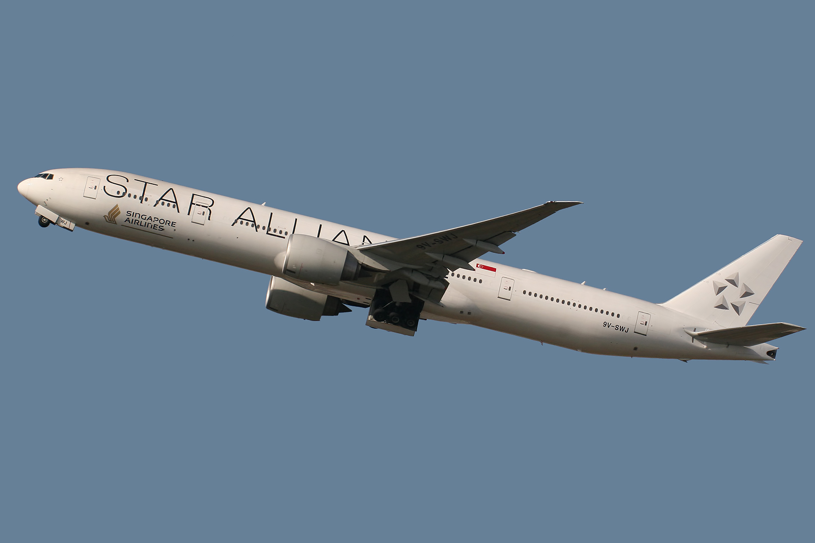 Barcelona El Prat (LEBL/BCN) Airport